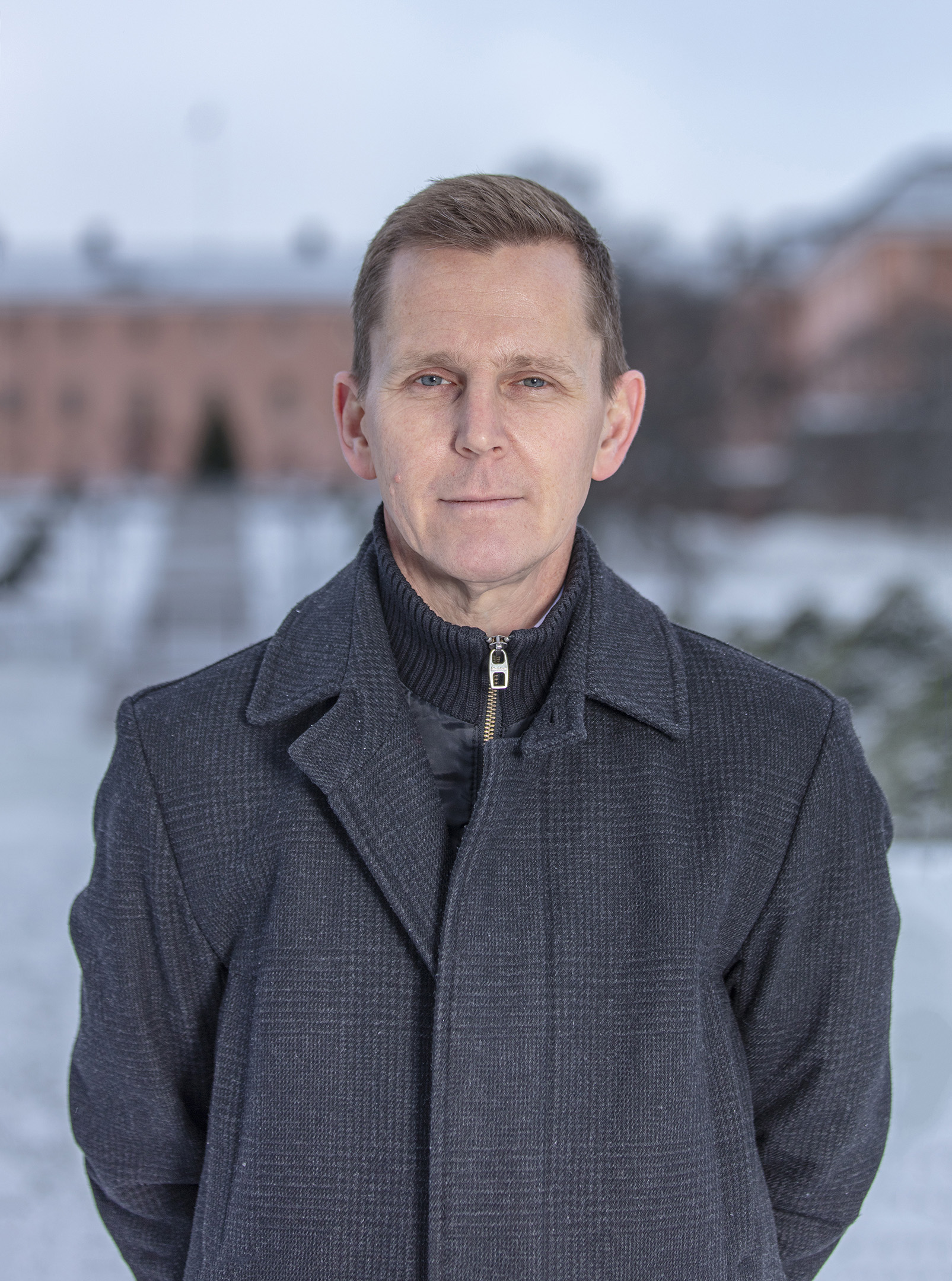 Johan Modin, chef för Etikprövningsmyndigheten i Uppsala.